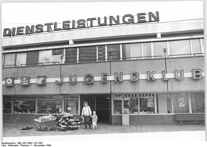 ADN-Thomas Uhlemann-1.11.90 Berlin: Marzahner Jugendklubs droht das Aus- Die 14 Jugendklubs in Marzahn sehen einer ungewissen Zukunft entgegen. Ursache für ihre Existenzbedrohung ist das Marktgebaren der BEDAG, ehemals Dienstleistungskombinat. Ihm wurde von der Treuhand u.a. die Rechtsträgerschaft über die "Dienstleistungswürfel" in den Neubaugebieten - wie hier in der Fichtelbergstraße 1- übertragen. In den DLB-Annahmekomplexen befinden sich Klubs, Friseure, Schuster und Reinigungen. Der neue Eigentümer will in den Räumlichkeiten Drogeriemärkte eines Unternehmens einrichten. Vom Bezirksamt fordert er mittlerweile für die Jugendklubs pro Quadratmeter 18,--DM Miete."